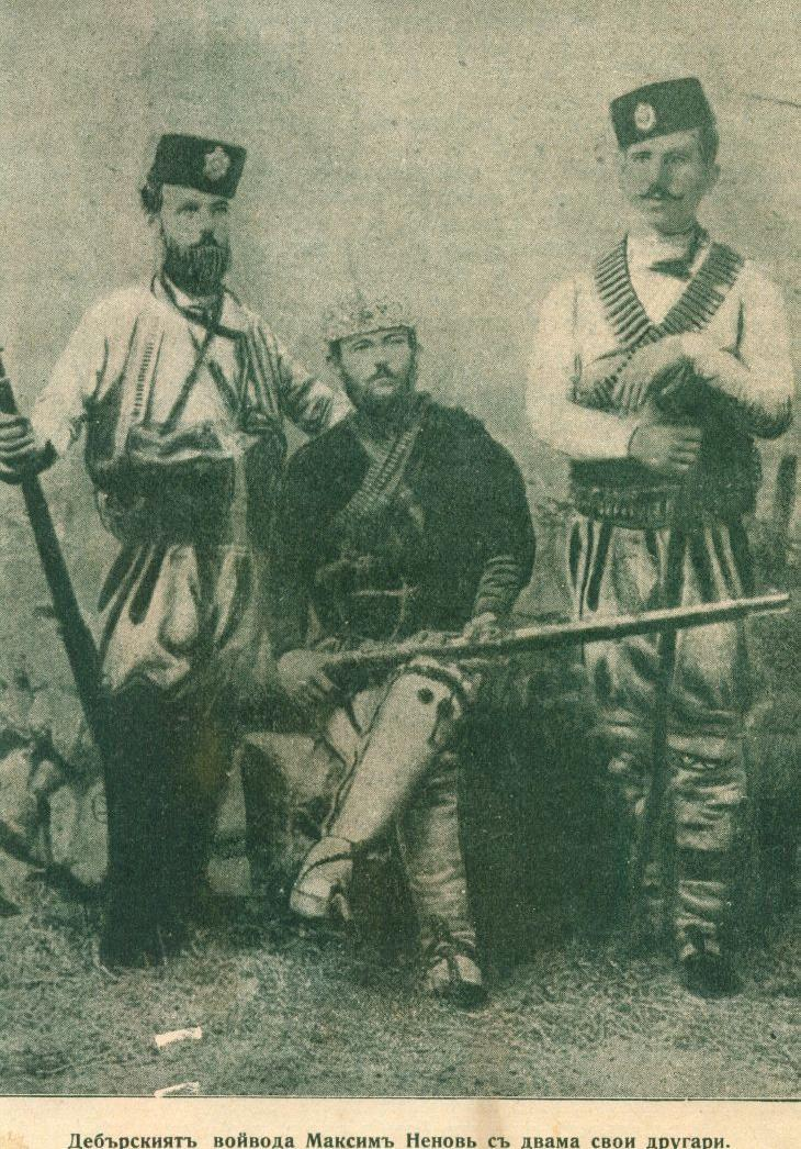 Максим Ненов.